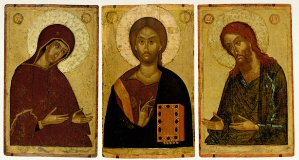 ДЕИСУСНЫЙ ЧИН Первая половина XV века Псков Дерево; темпера БОГОМАТЕРЬ 110 х 68, СПАС ВСЕДЕРЖИТЕЛЬ 110 х 67, ИОАНН ПРЕДТЕЧА 110 х 68 Поступил в 1930 году из ГИМ Происхождение неизвестно Реставрация домузейная ГТГ инв. 12856, 12857, 12855